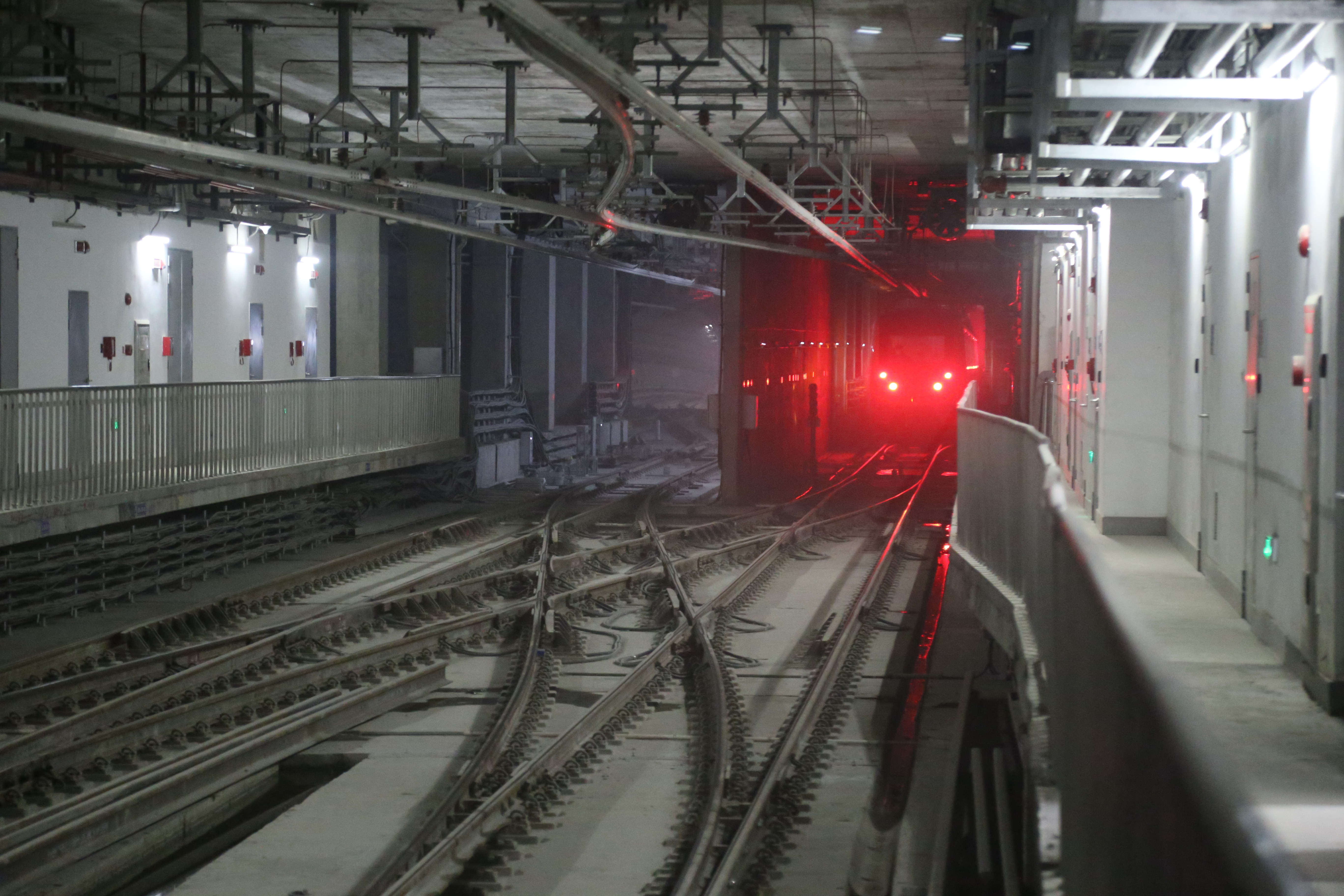 4号线列车在折返